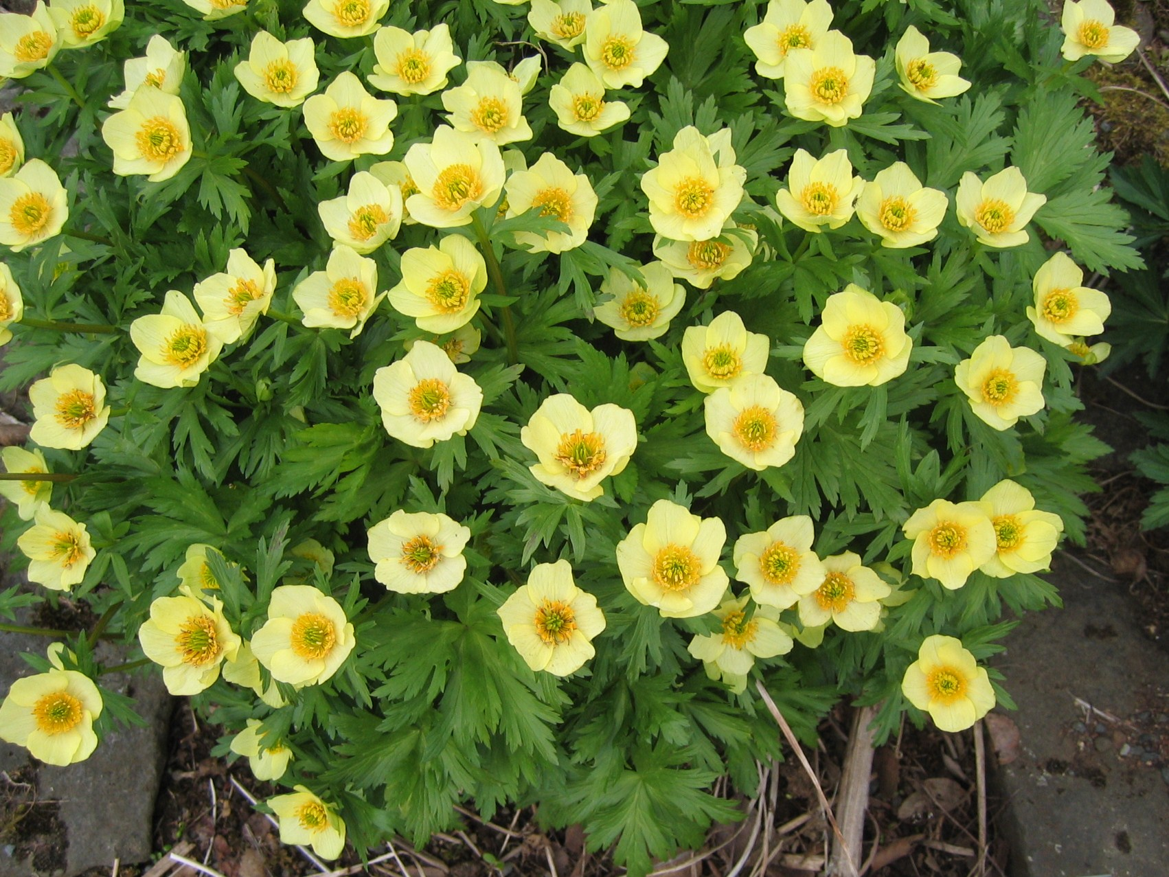 photo taken by Salvör in Grasagarður Reykjavíkur Botanical garden in Reykjavik, Iceland.